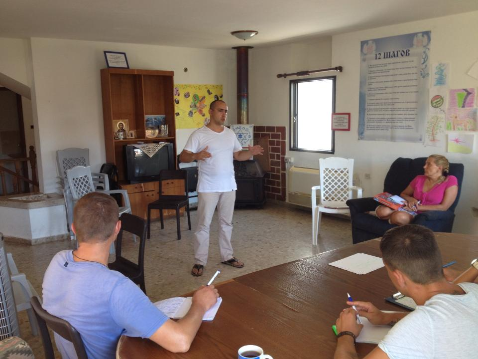 Групповое занятие (реабилитационный центр ЦЗМ, г. Ашдод)